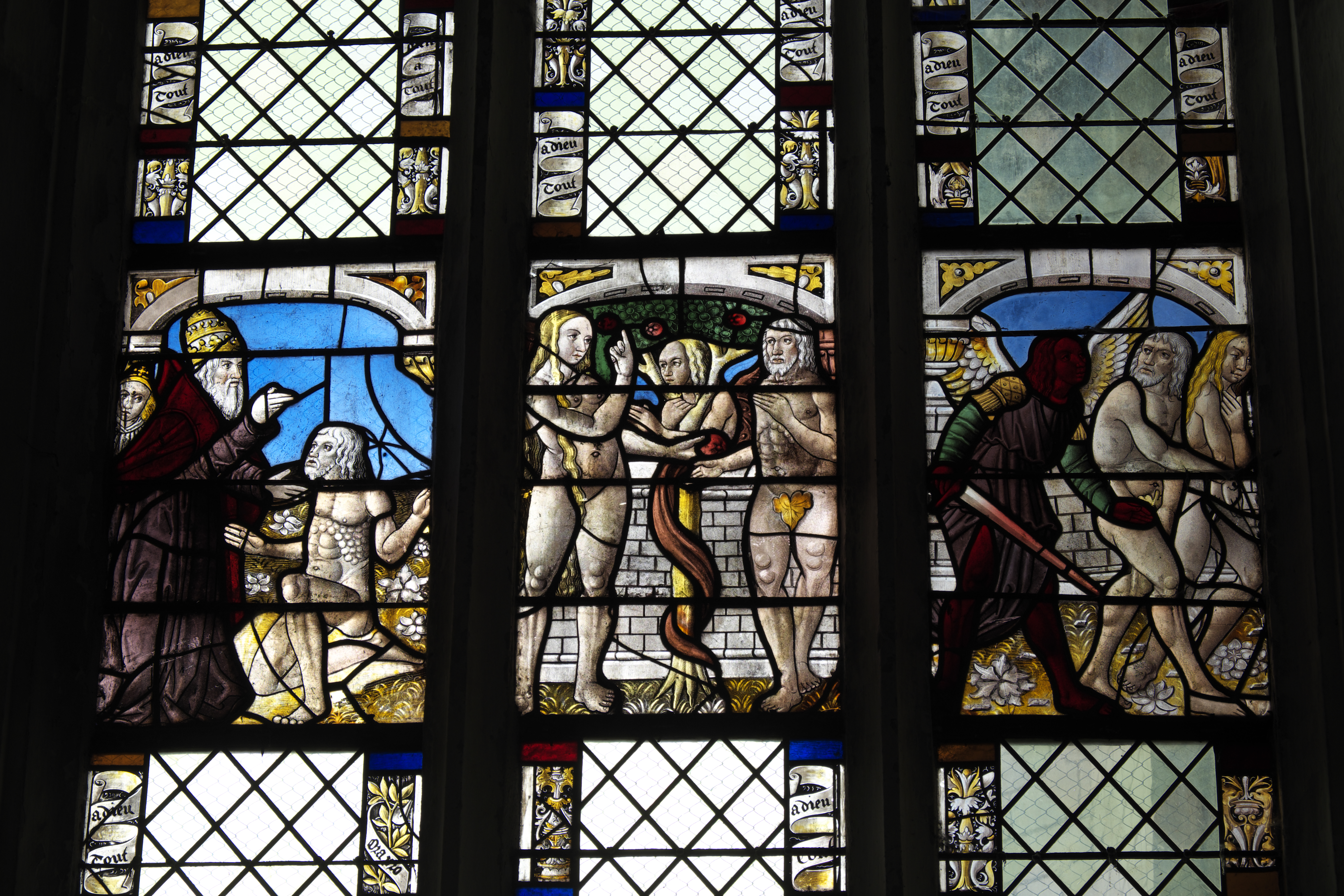 Katholische Kirche Notre-Dame-en-sa-Nativité in Puellemontier im Département Haute-Marne (Champagne-Ardenne/Frankreich), Bleiglasfenster um 1520; Darstellung: Erschaffung Adams, Versuchung, Vertreibung aus dem Paradies .